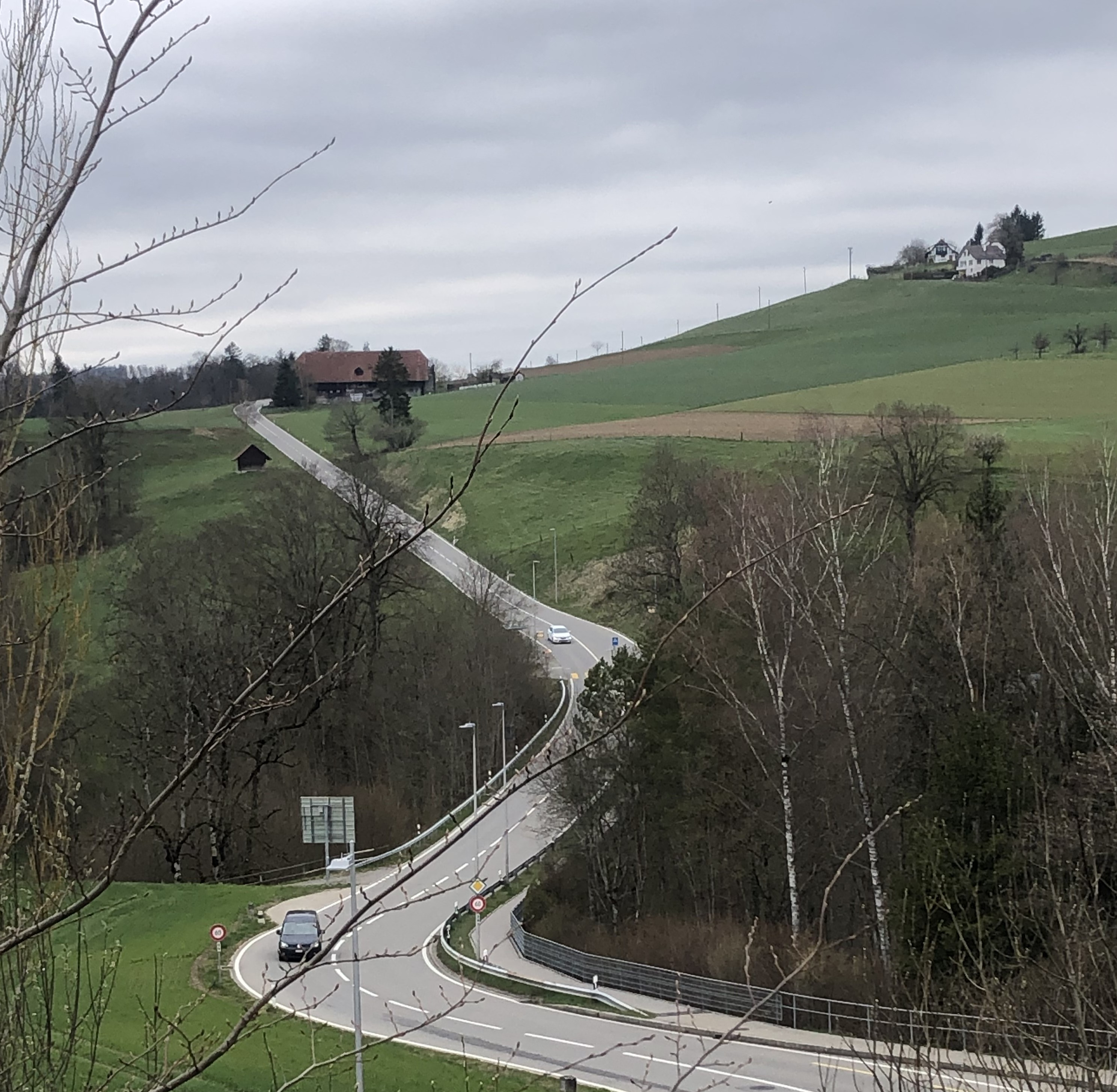 Riedern Blick von Brünnen aus